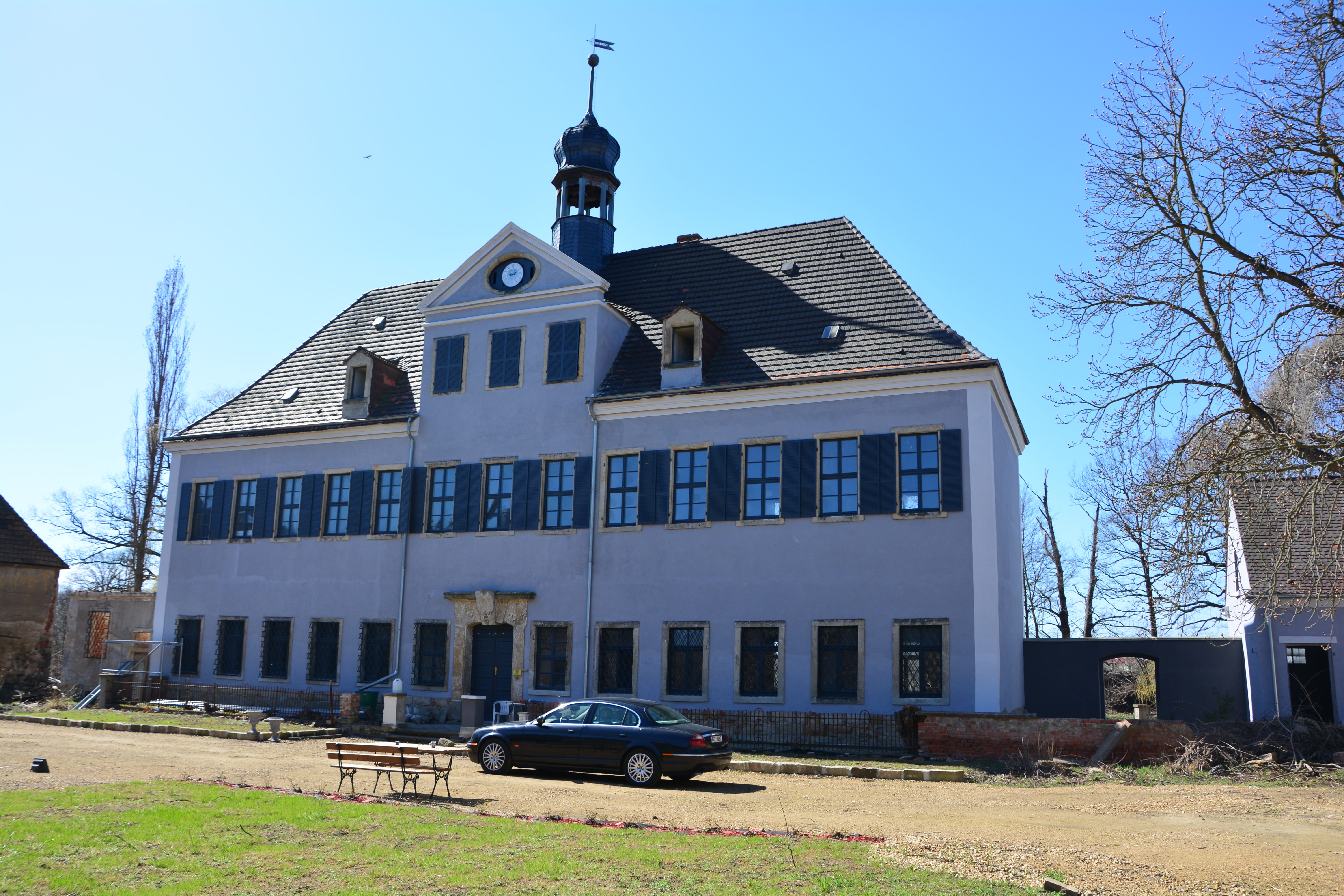 1551 wurde ein Vorwerk Bobersen genannt und dem Rittergut Promnitz untergeordnet war. 1696 wurde es ein Rittergut und der Schlossbau erfolgte unter Georg Ernst von Borau. Endlich erfolgt eine Sanierung des Anwesens. Zustand 2018